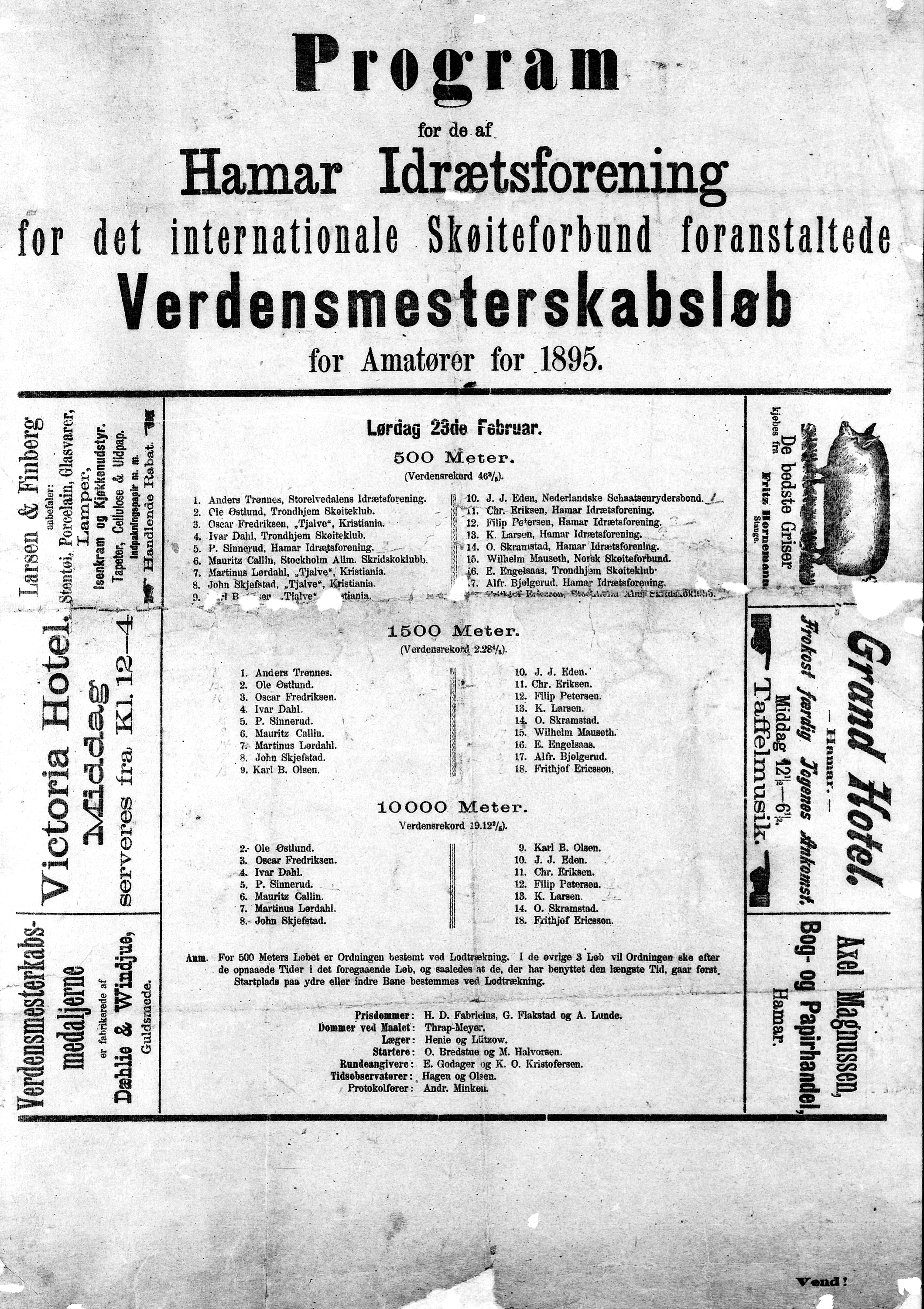 Program for verdensmesterskap - Hamar .Idrættsforening. Navn på løpere: 500 - 1500 og 10000 m. parsammensetning. En innlandsby vokser fram, bilde nr. 109 side 107. Fra Hamar bys historie fra 1899 av Chr. Ramseth